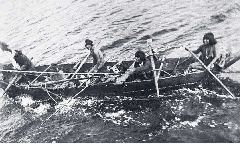 Grupo kaweshkar navegando en una dalca. Esta imagen es parte de una secuencia que fue tomada el año 1895 desde el vapor Bianca por el ingeniero Bauer. Colección Dirección Museológica de la Universidad Austral de Chile